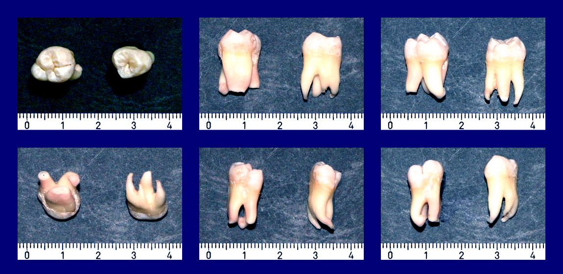 Eigene Weisheitszähne (unten und oben rechts) mit stark gebogenen Wurzeln (jedoch Teilweise bei der Extraktion beschädigt), aus verschiedenen Blickwinkeln. Einheit ist cm.